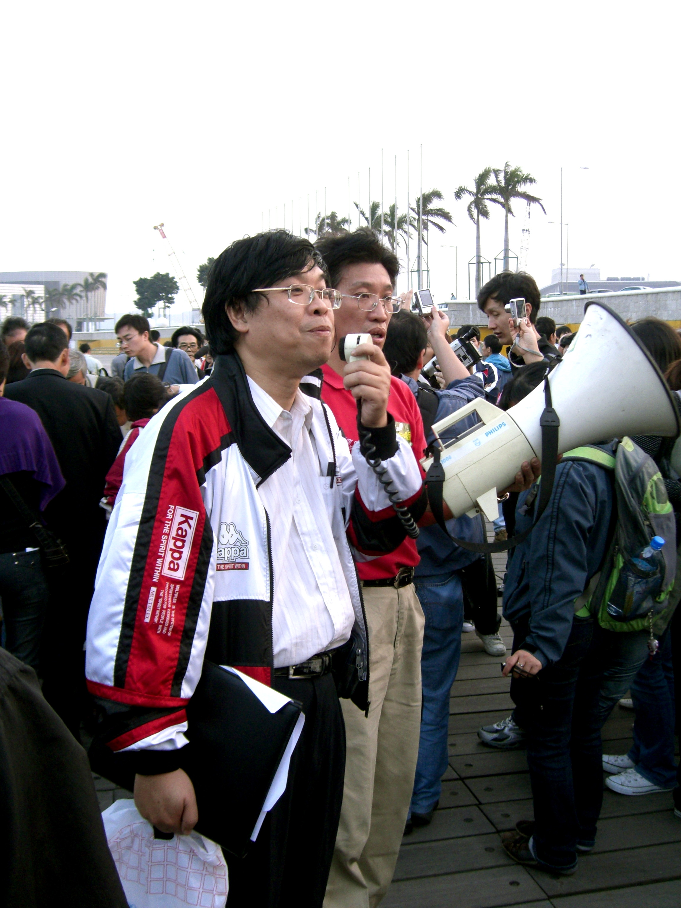 Kuok Cheong NG